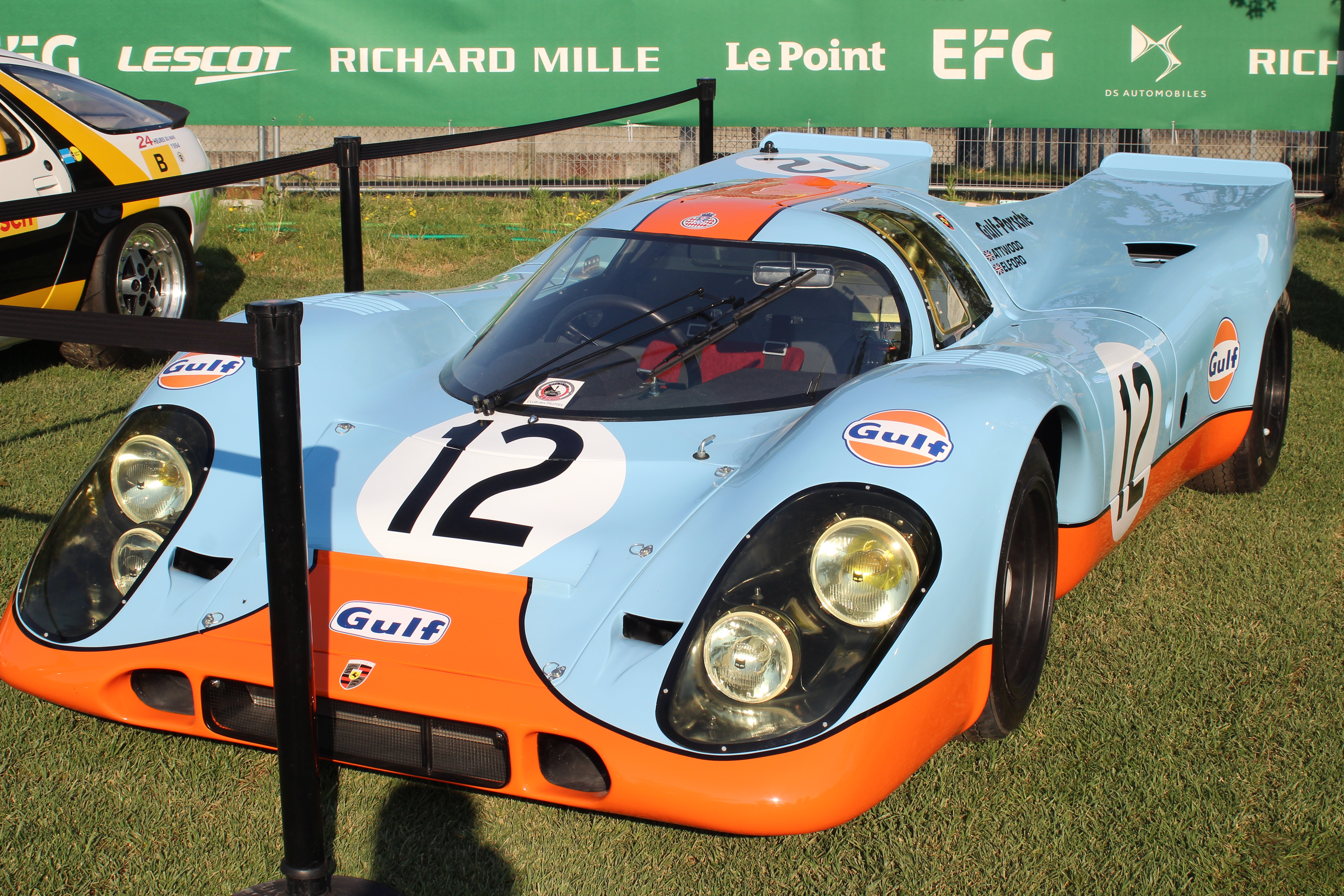 Porsche 917 LH au Le Mans Classic 2018